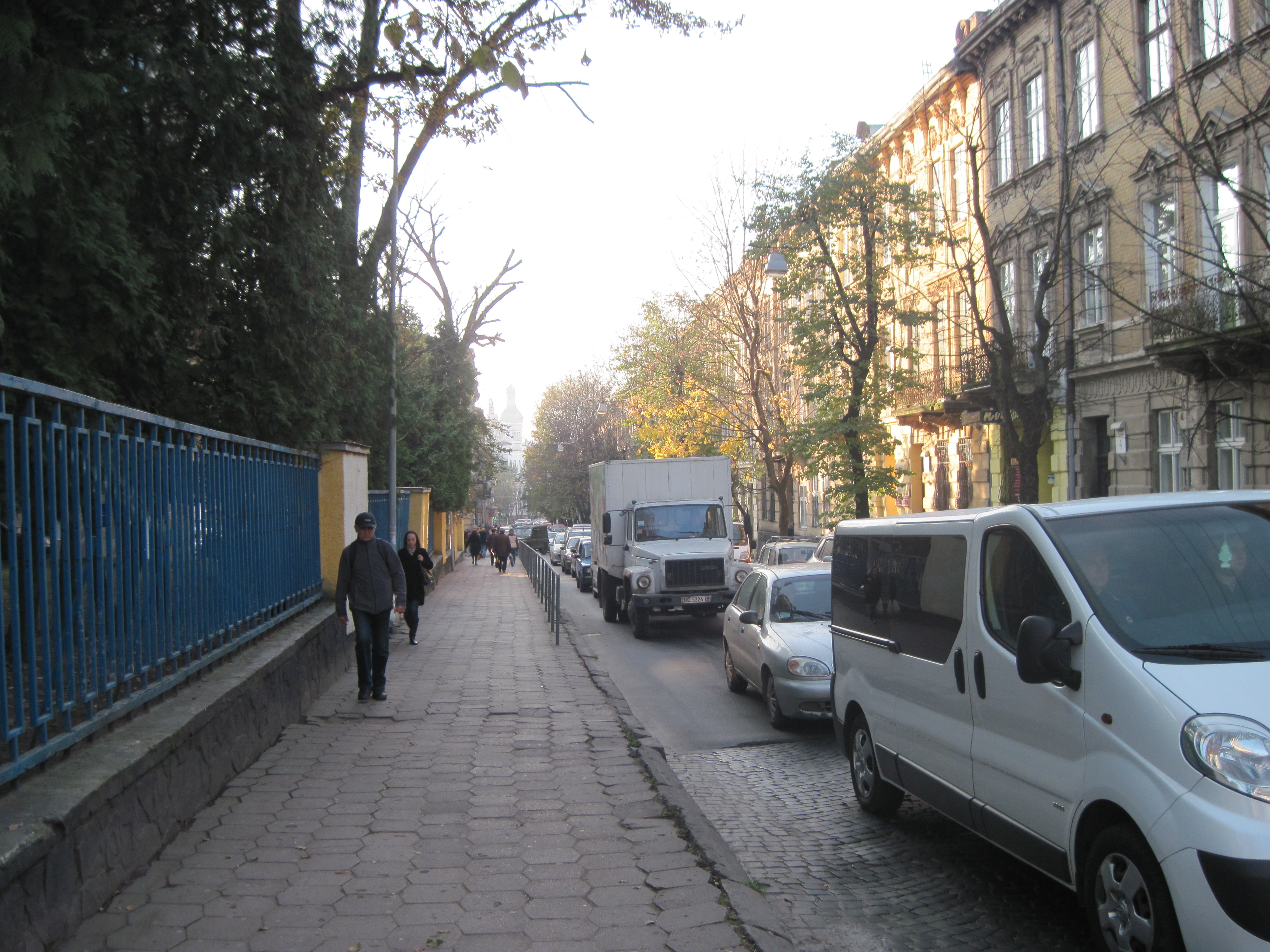 Корок при виїзді на Личаківську з Чехова, Львів, 2014